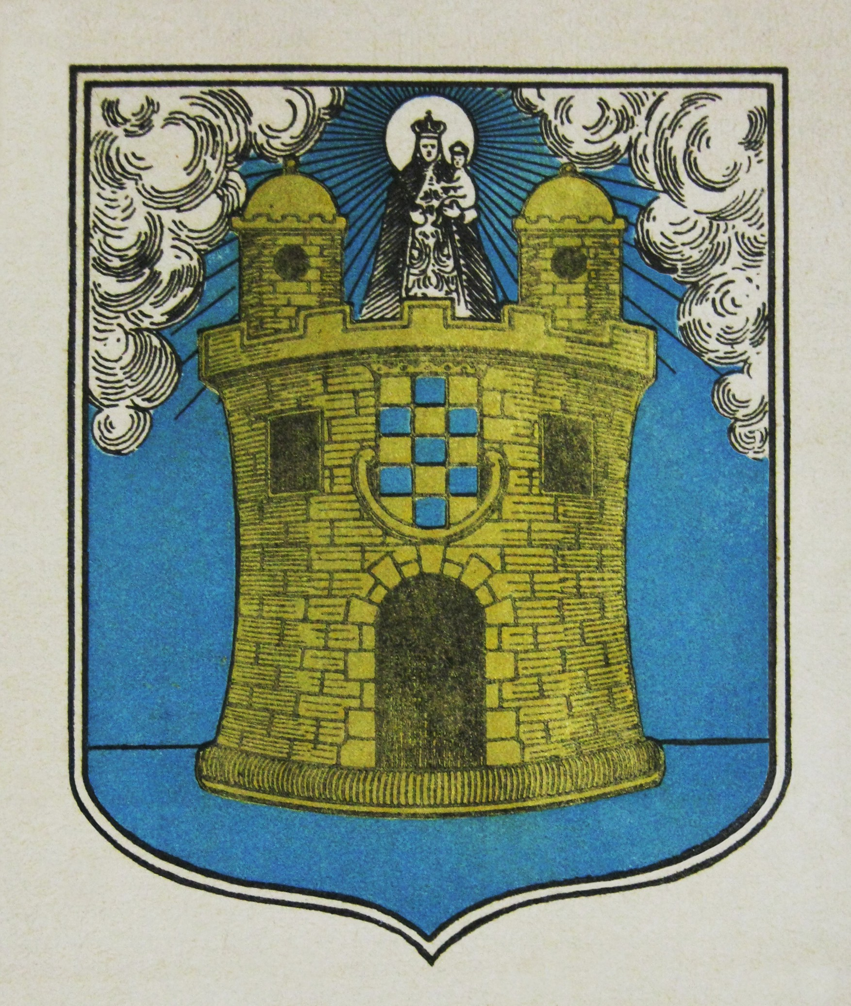 Escudo de Armas de Medellín, tomado de libro "Medellín 1675 - 1925".